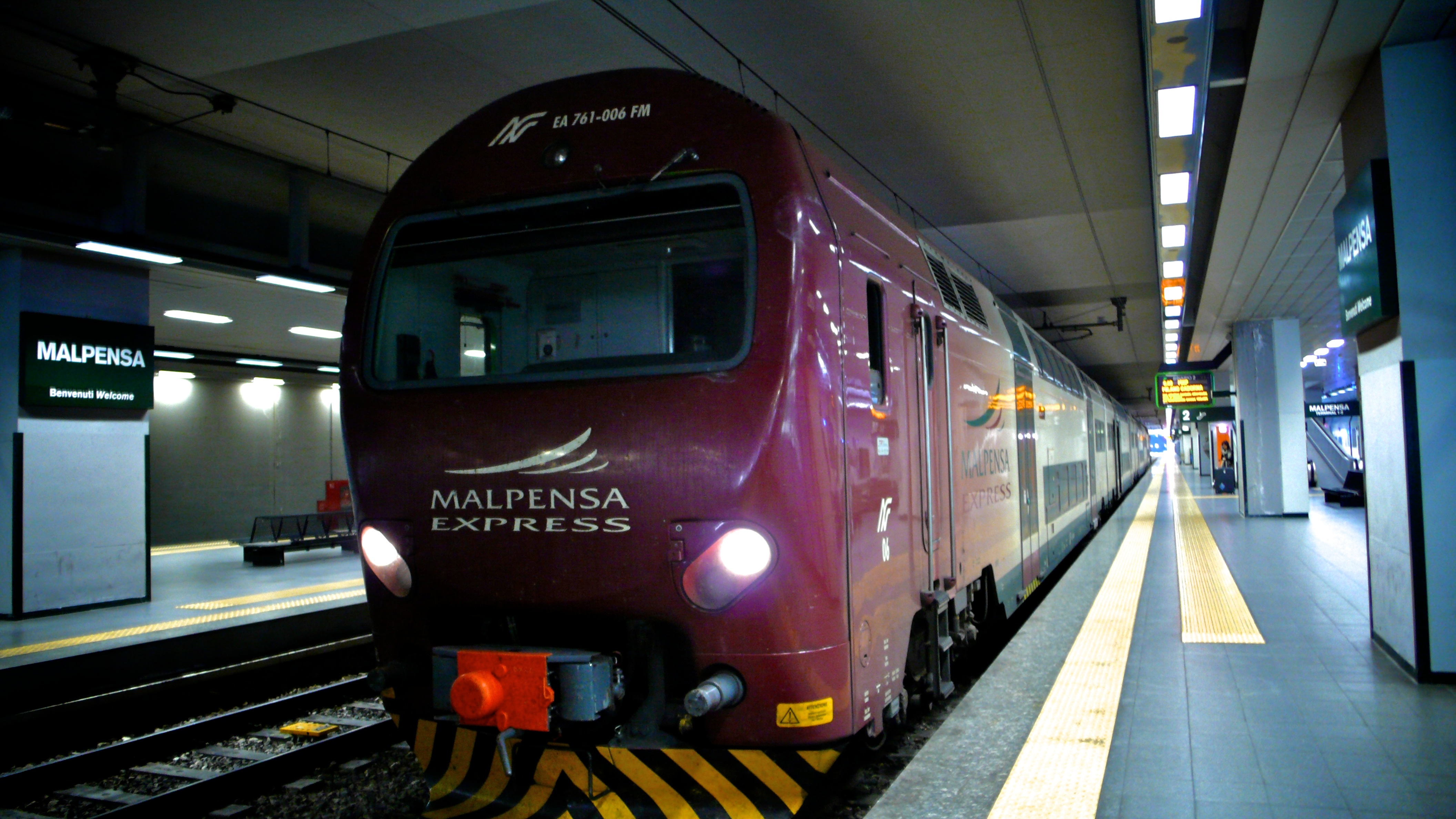 Elettrotreno tipo TAF effettua il collegamento Malpensa Express alla stazione di Malpensa